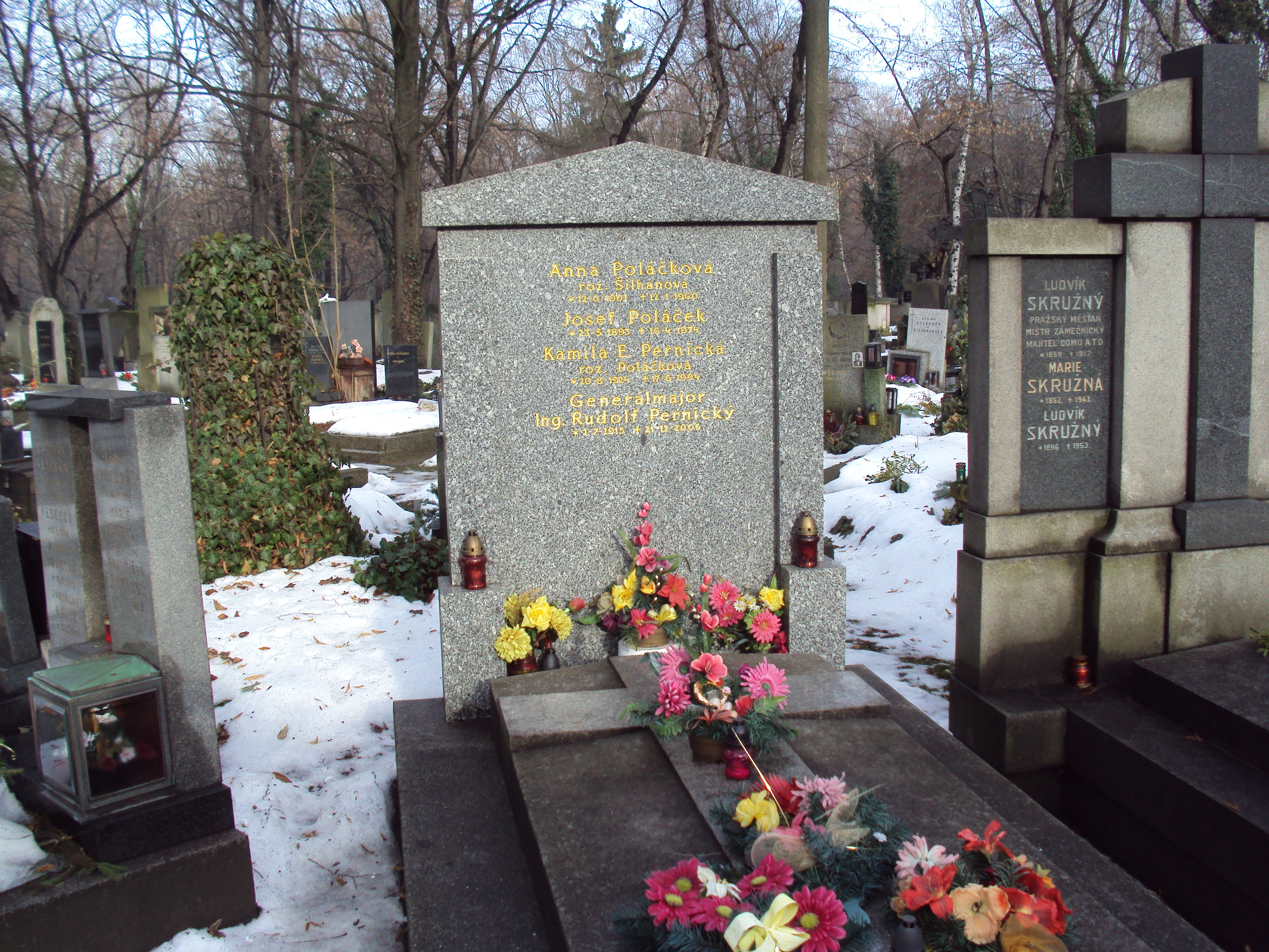 Hrob na Olšanech